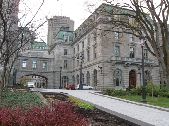 L’édifice Pamphile-Le May, à Québec, abrite la bibliothèque de l’Assemblée nationale du Québec. À gauche, on aperçoit la passerelle qui relie la Bibliothèque à l’Hôtel du Parlement. Photo prise le 8 novembre 2013.